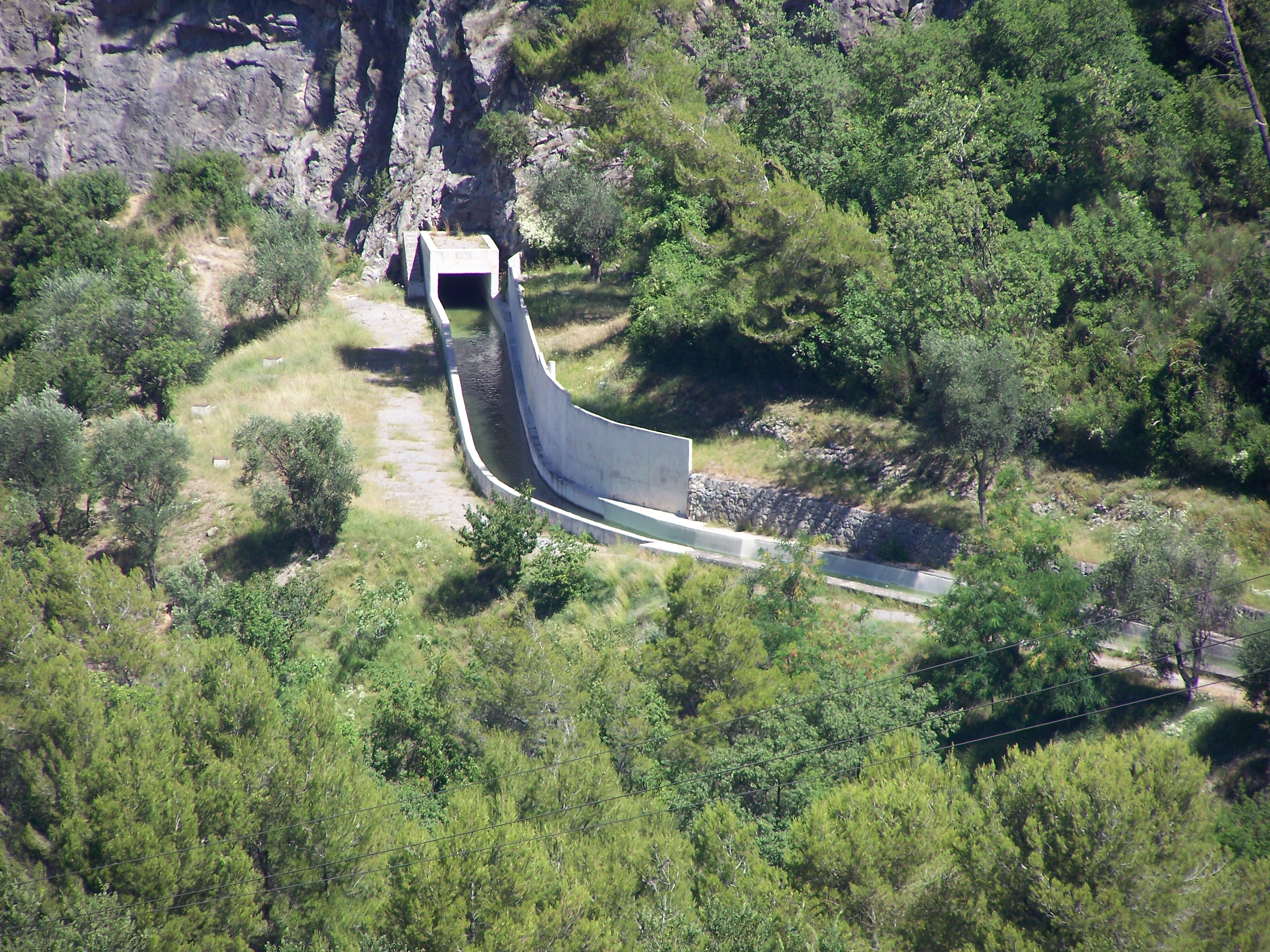 "Canal de la Vésubie" sur la commune de la Roquette sur Var (Alpes-Maritimes, France), construit en 1880 pour amener à Nice l'eau de la Vésubie à partie de Saint Jean la Rivière.